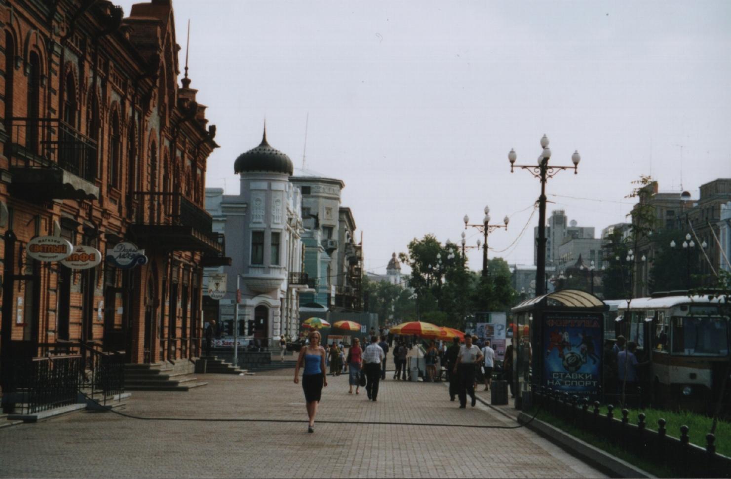 Chabarowsk